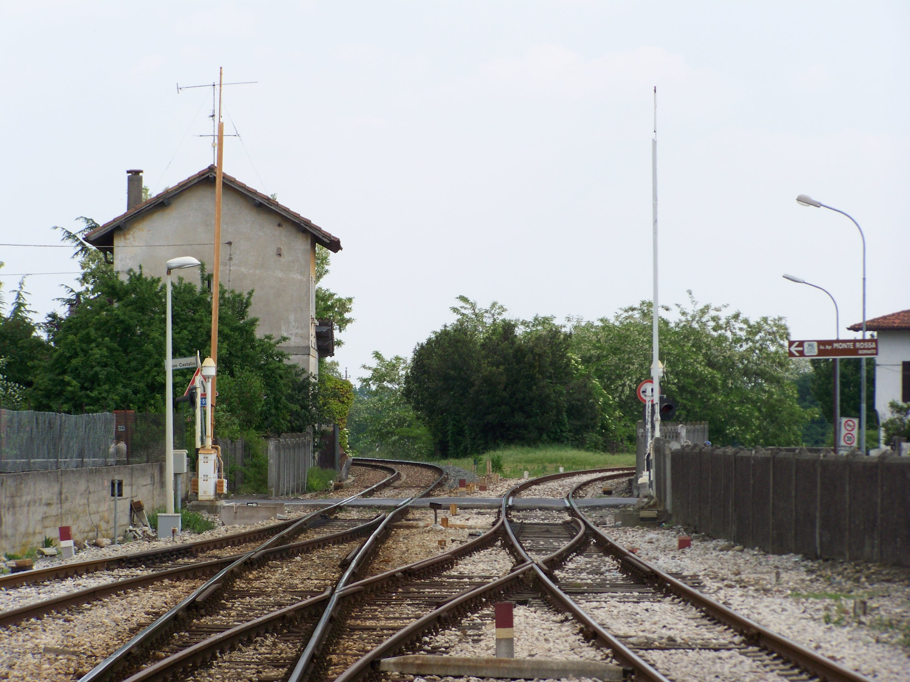 Il bivio per Paderno e Rovato presso la stazione di Bornato-Calino lungo la Brescia-Iseo-Edolo. A destra, la direzione per Rovato Borgo, mentre a sinistra i binari si dirigono verso la stazione di Paderno.